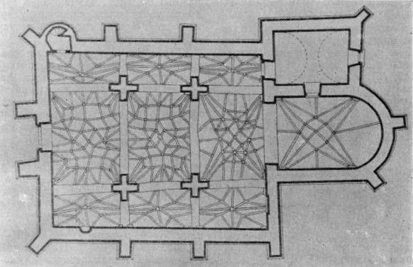 План царквы ў Кодне